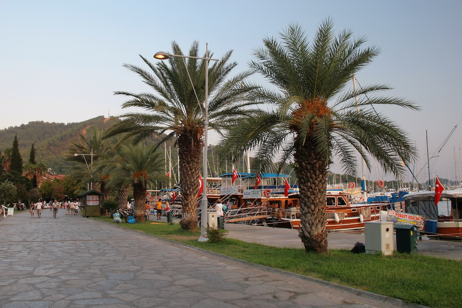 Göcek